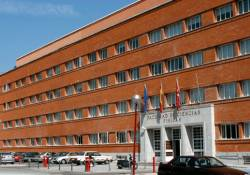 Facultad de Física